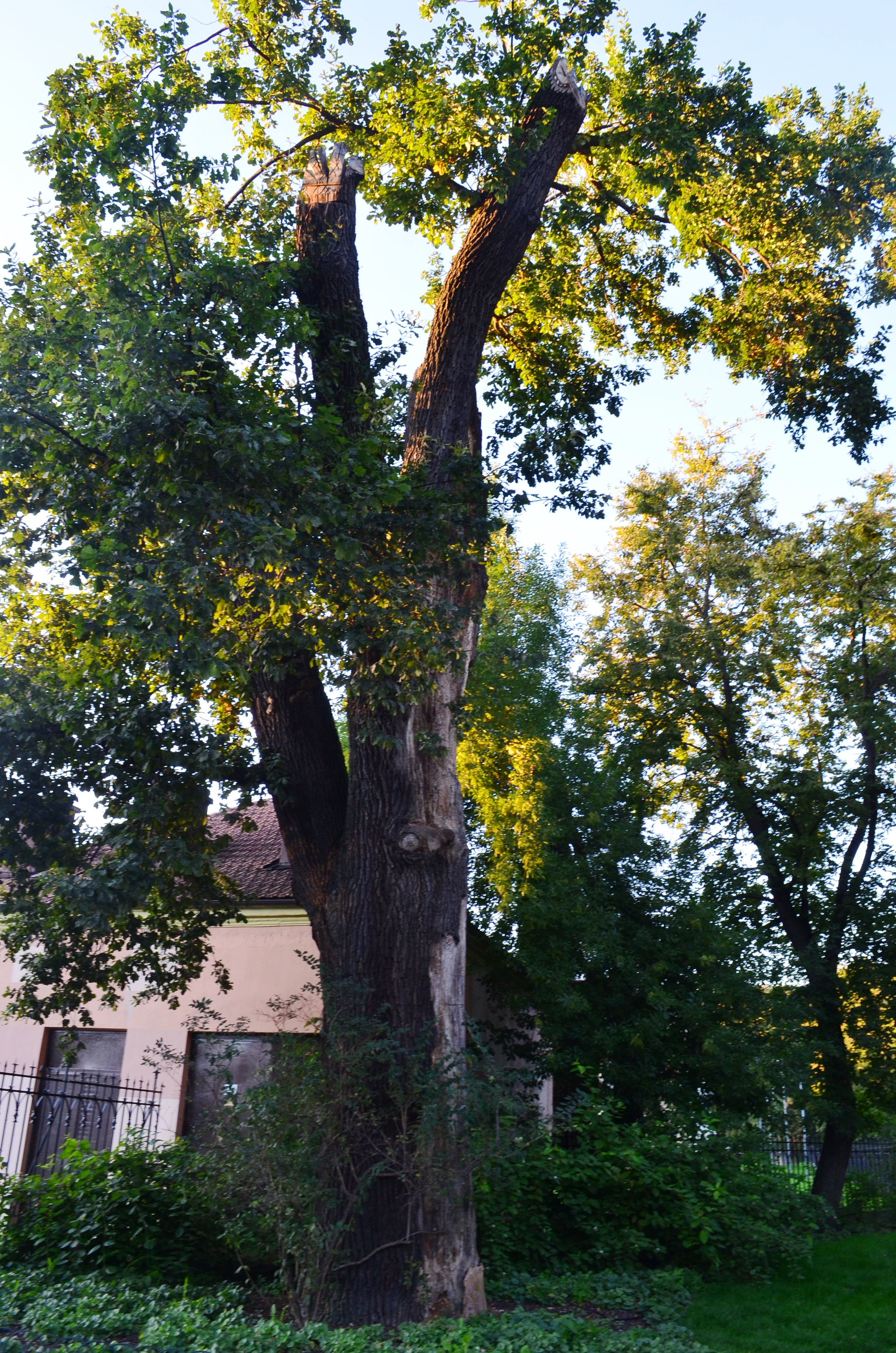 Saugomas ąžuolas Sereikiškių parke